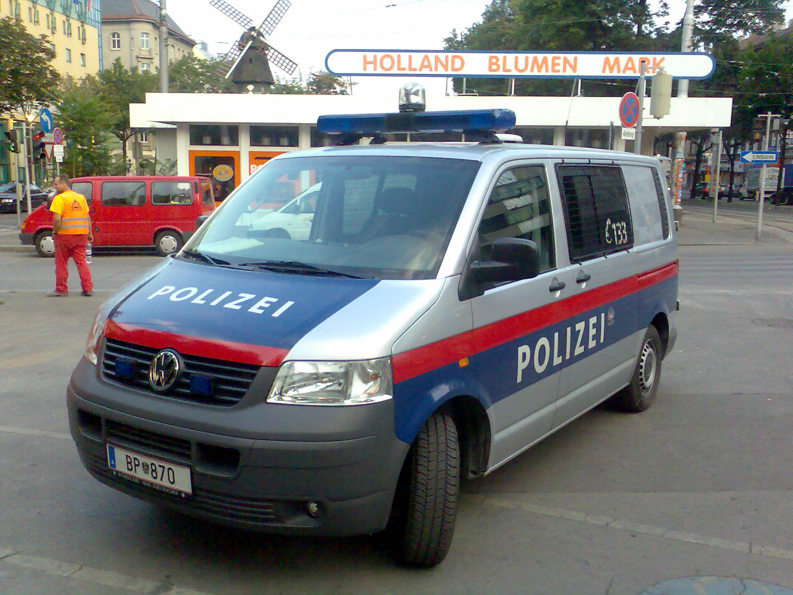 VW-Transporter der Diensthundeführer der Österreichischen Bundespolizei, zum Transport der Diensthunde bestimmt.